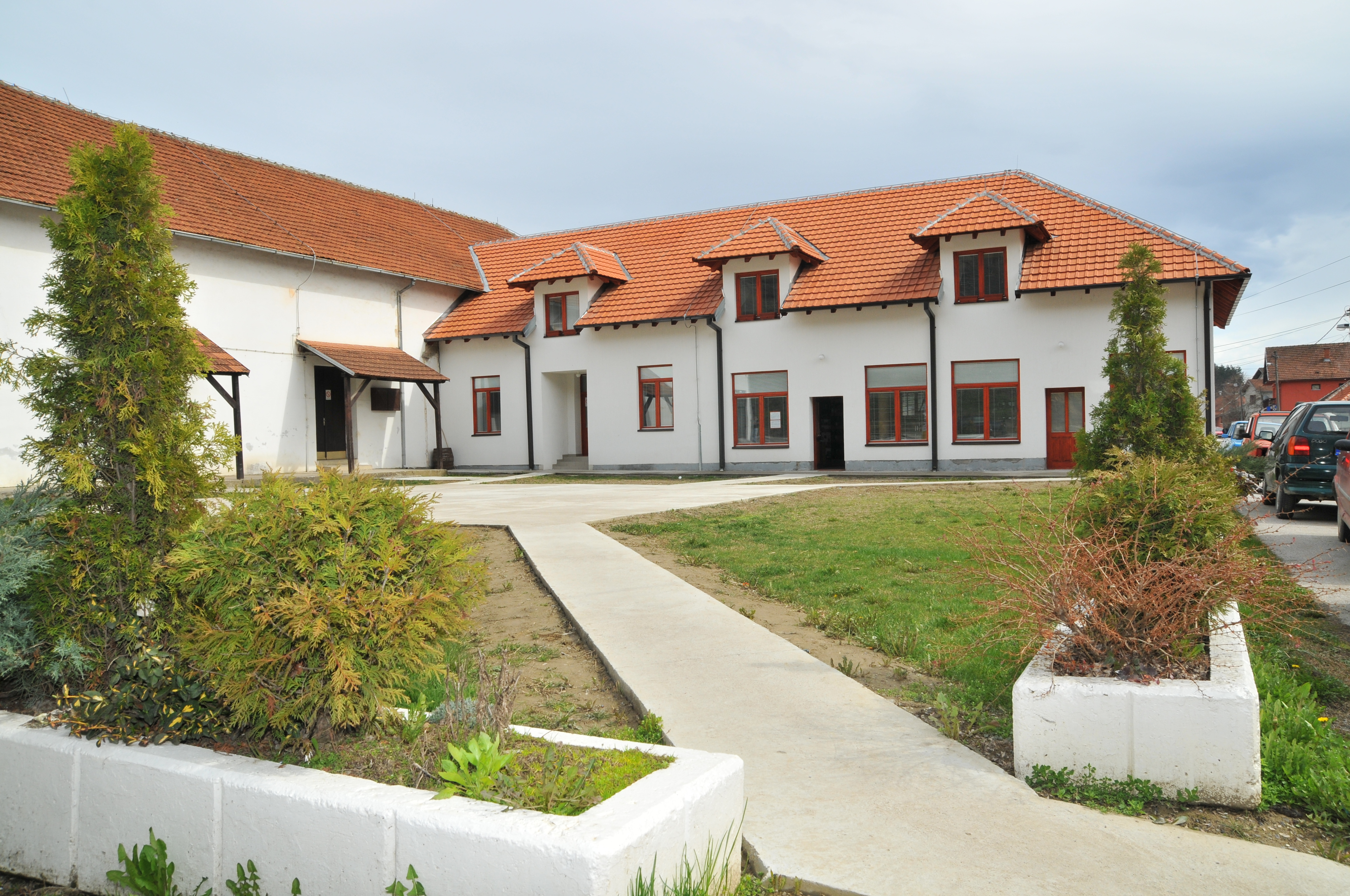 Narodna biblioteka Osecina